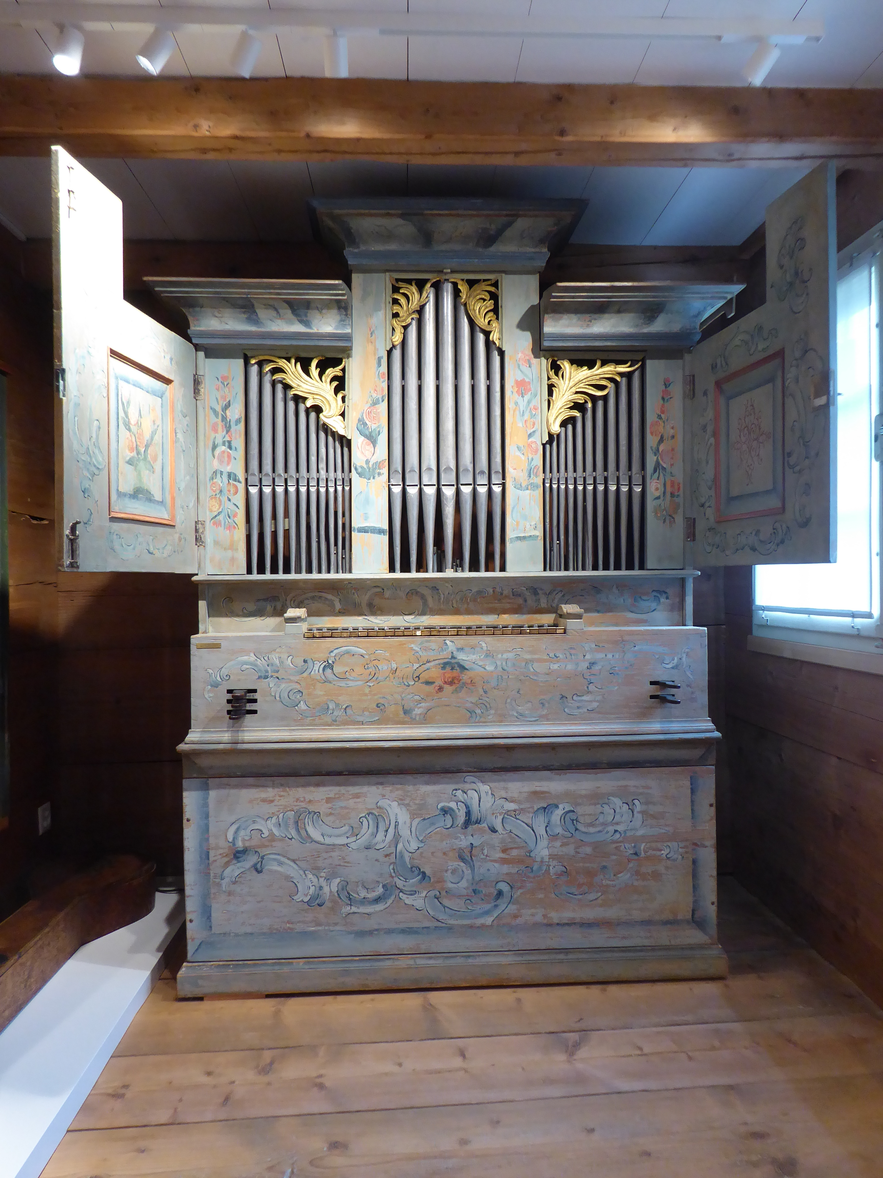 Toggenburger Hausorgel von Wendelin Looser, 1772. Die Fassung wurde teilweise ergänzt und die rechte Flügeltür erneuert. Der Blasbalg wurde durch einen Motor ersetzt.